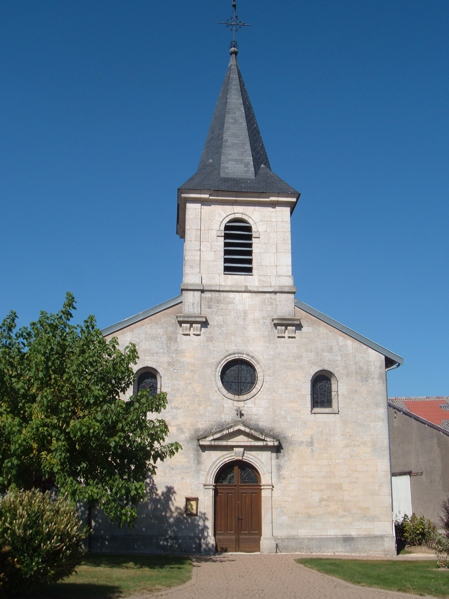 église de Belleray